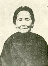 Bân-lâm-gú: 洪鴦 Âng Iong